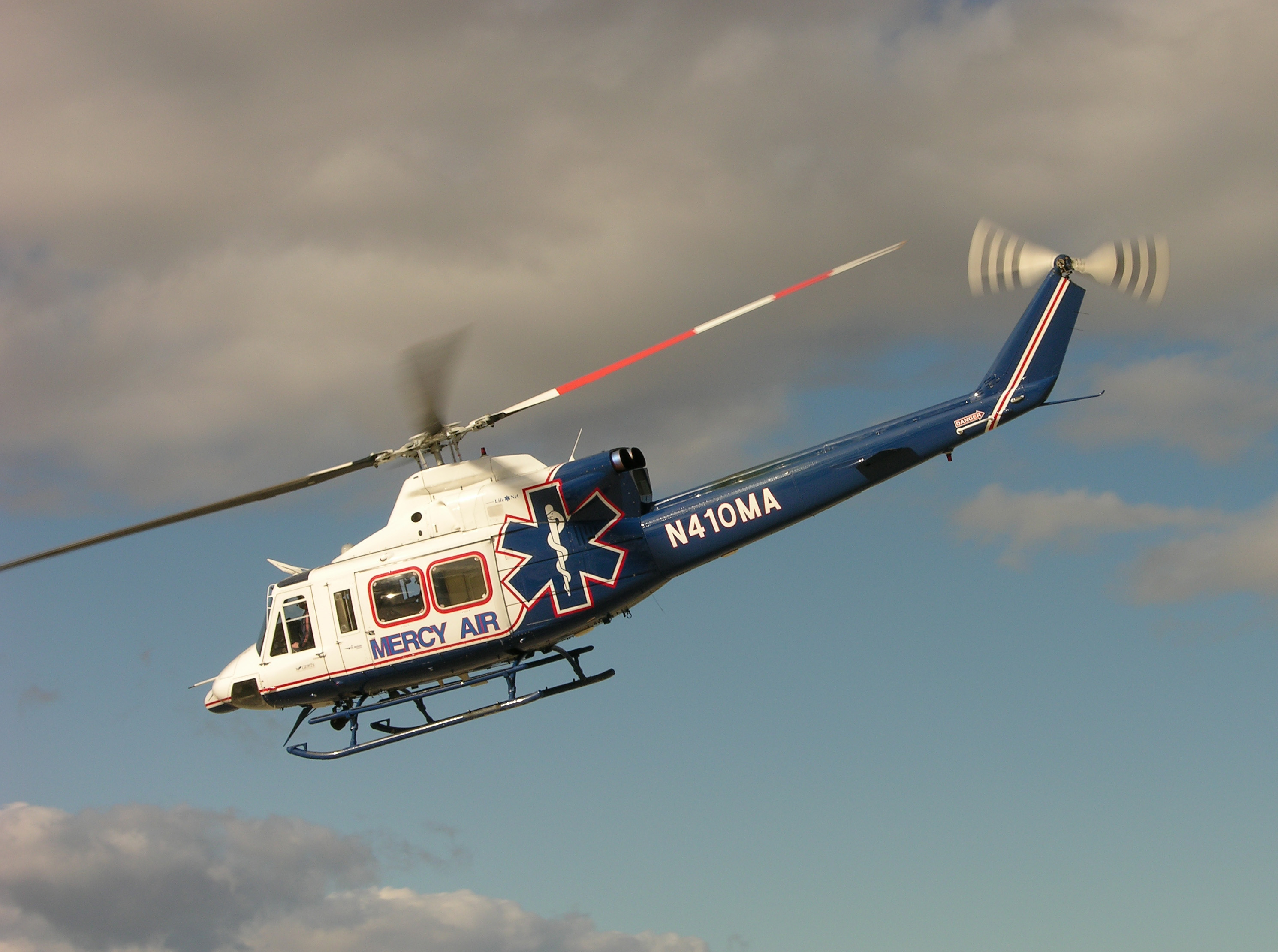 Mercy Air 2, a Bell 412, departs Mojave Ca